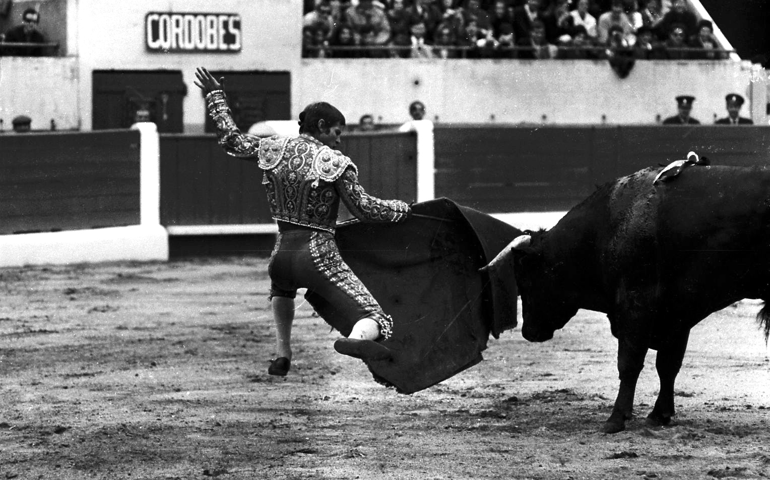 Les arènes de Toulouse. 5 Mai 1968. Vue de la corrida d'El Cordobés dans les arènes de Toulouse.